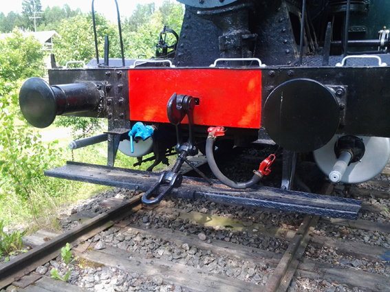 Vaihtotyössä käytetty astinlauta Vr1 661 -veturissa